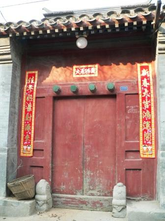 蛮子门 拍摄